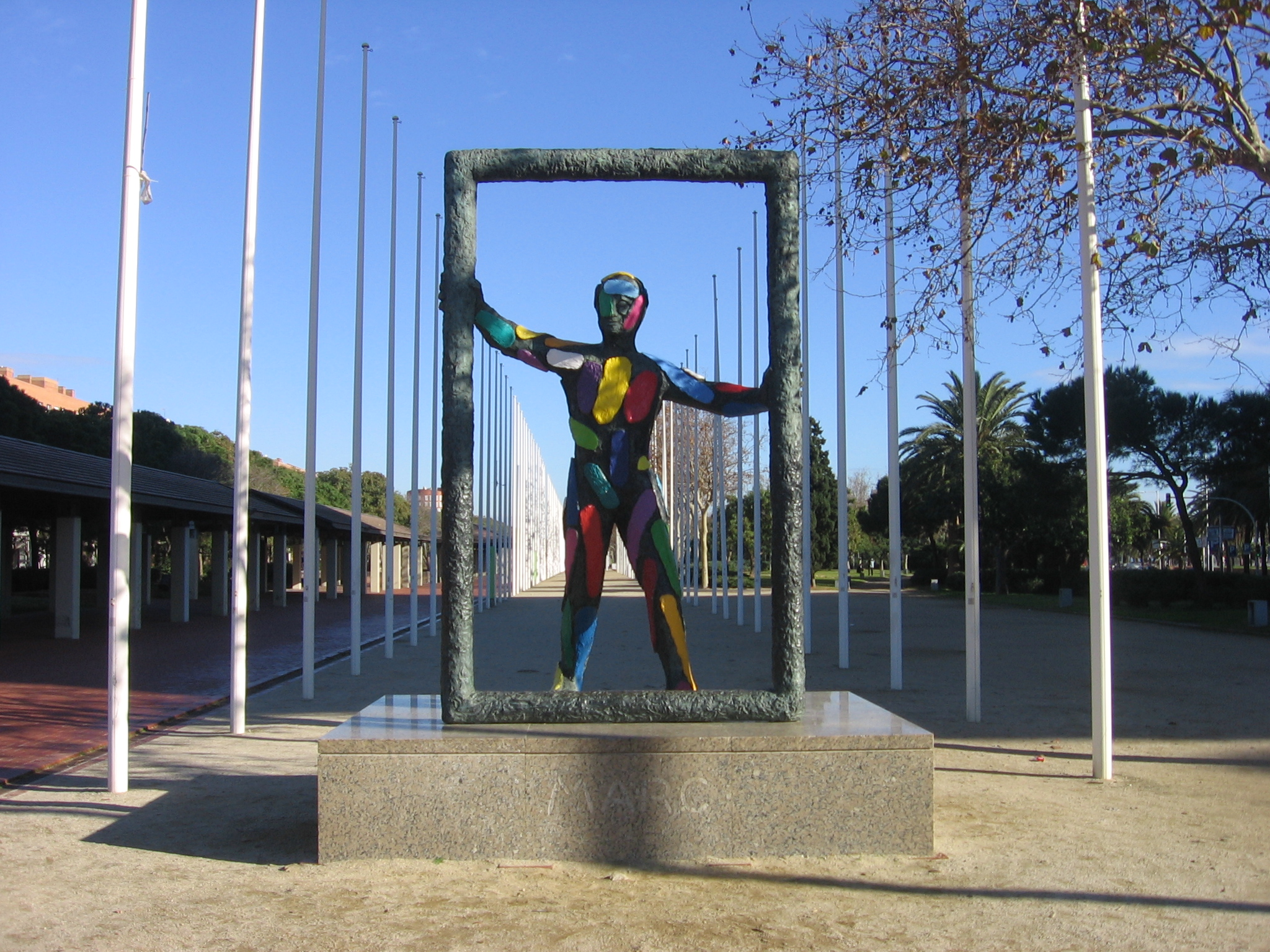 Marc, de Robert Llimós, Parque del Puerto Olímpico.